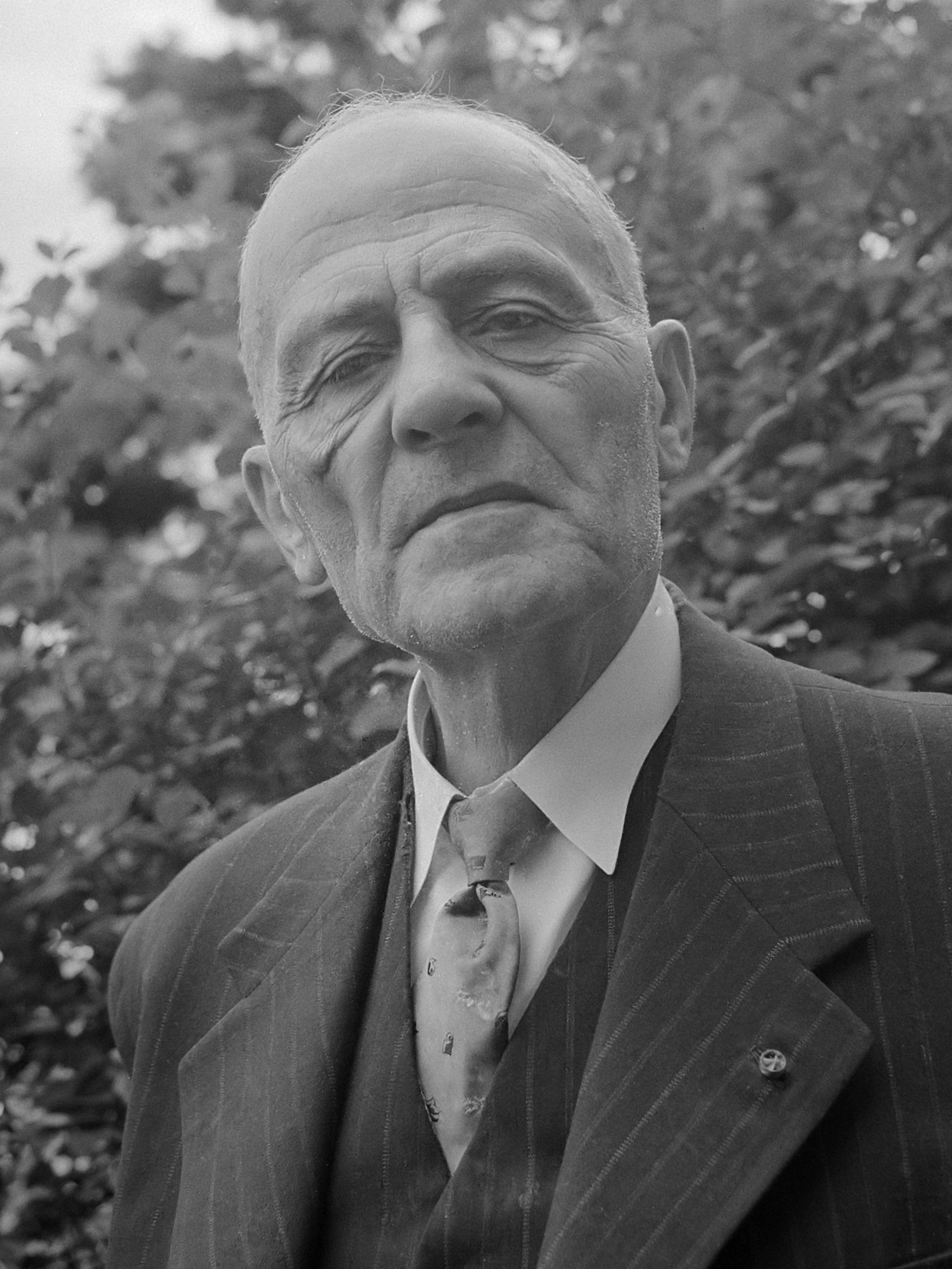 Dr. Ritter 75 jaar 2 augustus 1957